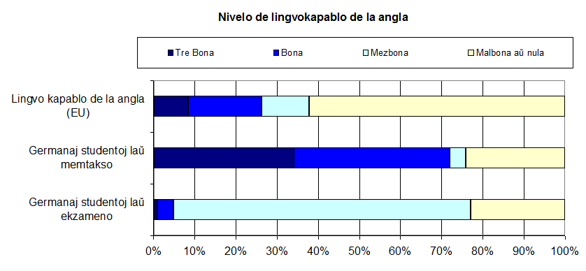 Grafiko montranta la lingvokapablon de la angla kiel fremdlingvo en Eŭropa Unio, kaj en grupo da germanaj studentoj, laŭ memtakso kaj laŭ ekzameno. Propra laboro sub GFDL. Kategorio:Lingvoj de Eŭropo